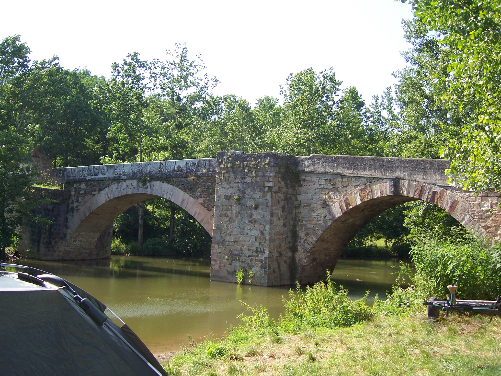 Photo du Pont Saint Blaise à Najac sur l'Aveyron, vue depuis l'aval.